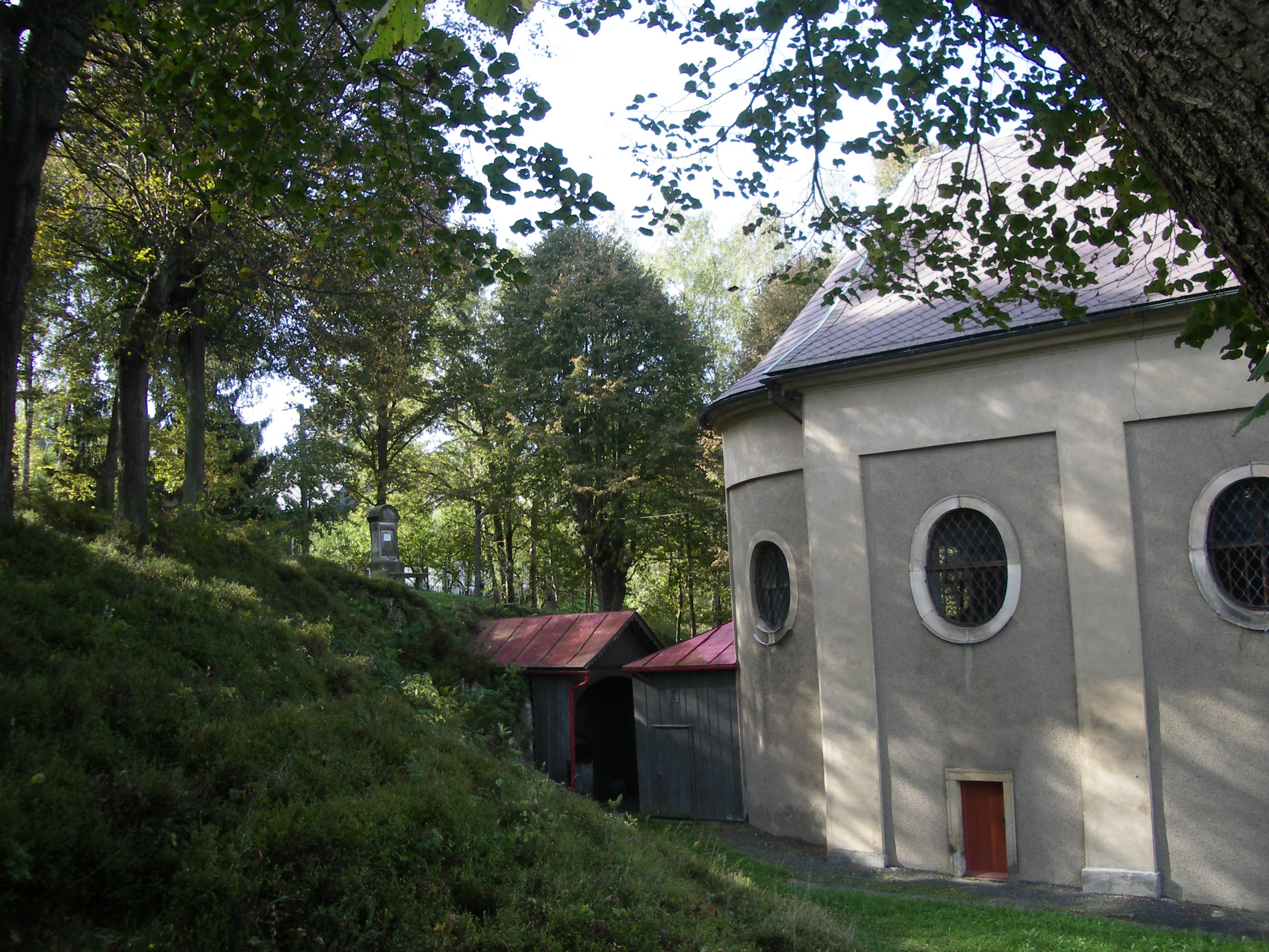 Seitliche Ansicht des hinteren Teils der Kirche mit Apsis und angebauter Sakristei. Hinter der Kirche und in den Hang gebaut befindet sich das sog. Heilige Grab, die Abschlussstation (Station 14) des um die Kirche verlaufenden Kreuzweges.